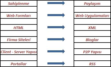 Web 1.0 - Web 2.0 Farkları